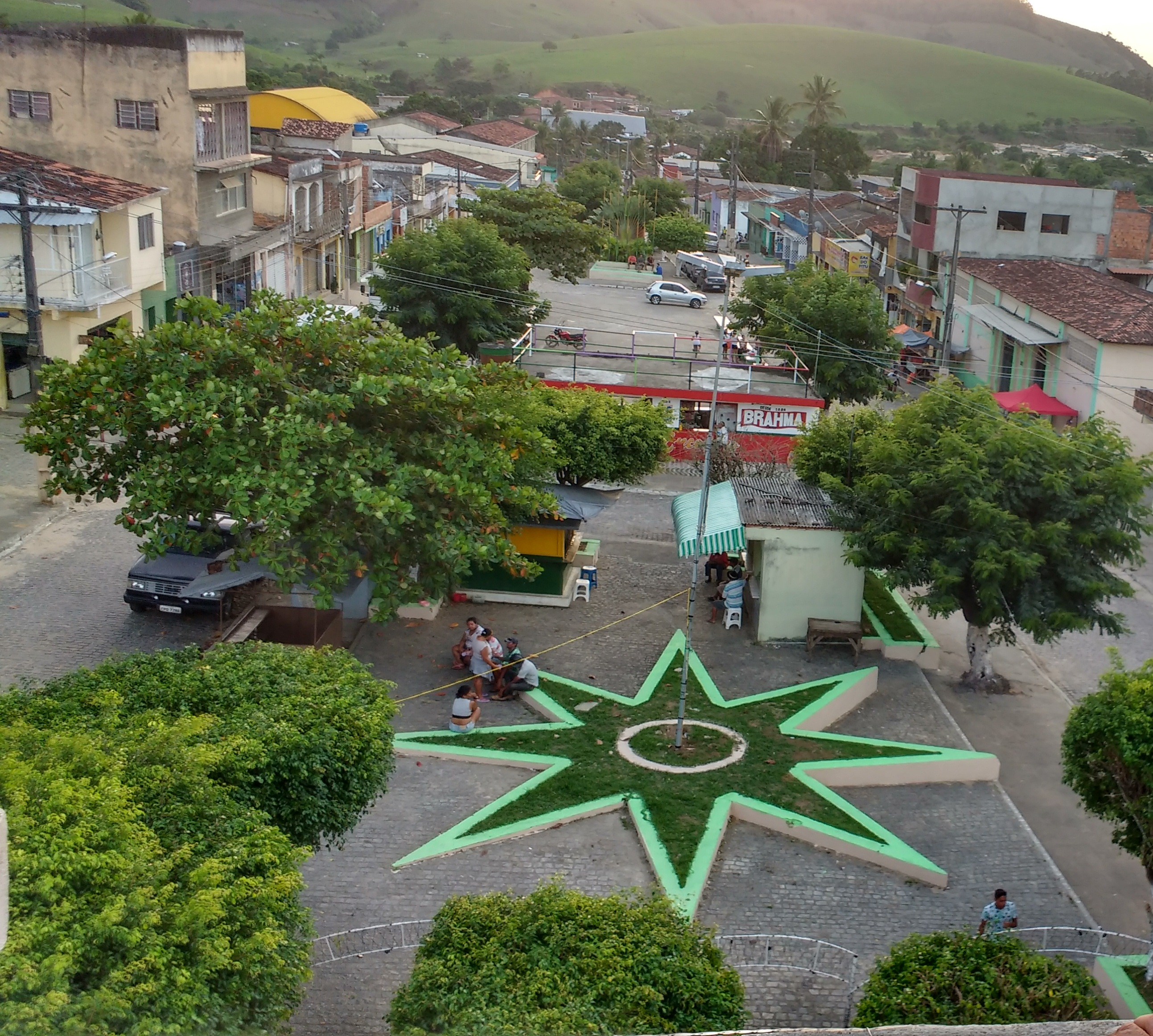 Centro do distrito de Laje Grande. Visão da torre da Matriz de São Vicente Ferrer